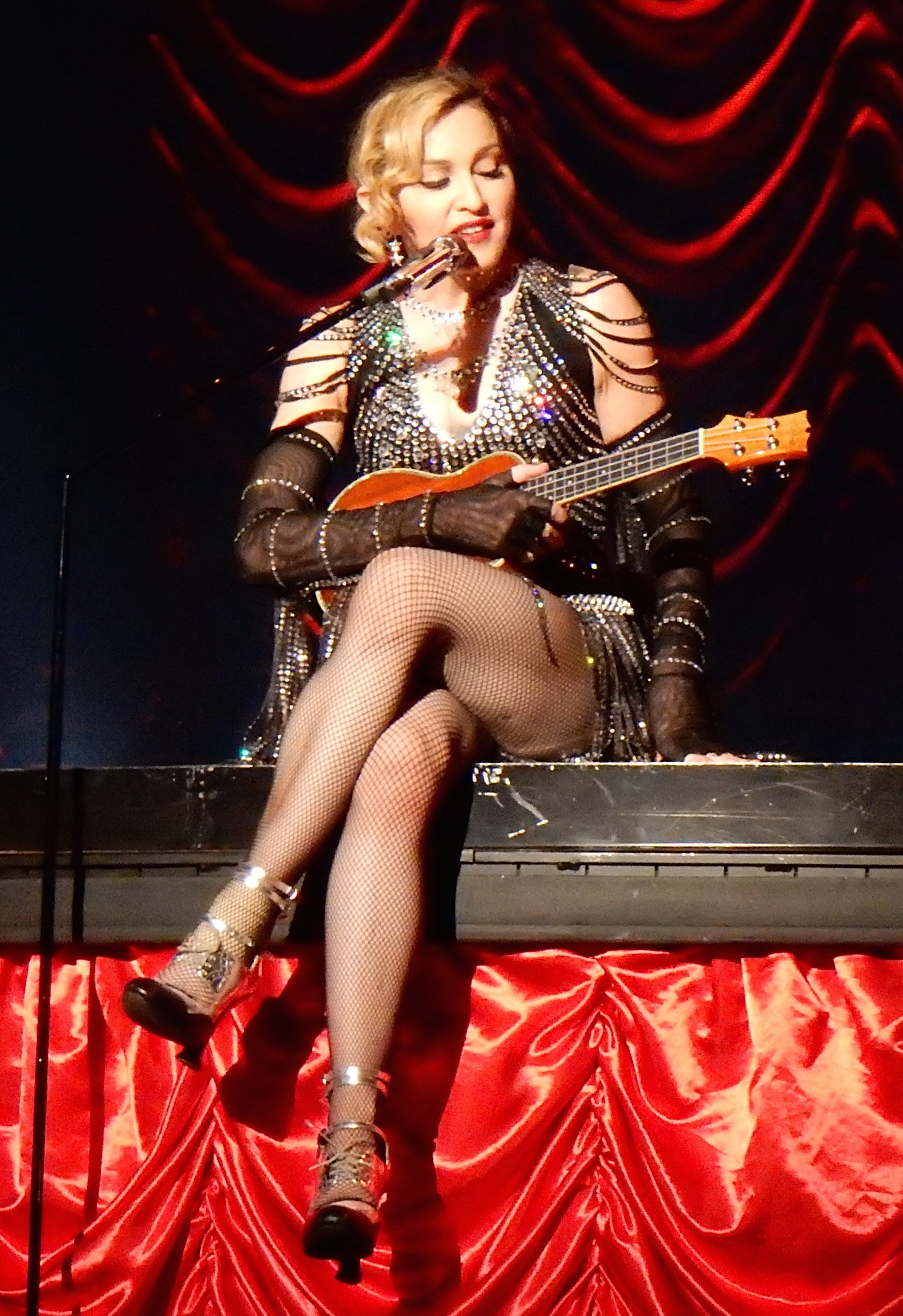 Madonna - Rebel Heart Tour Cologne 2